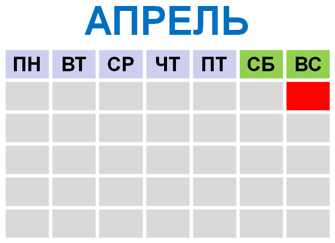 День геолога - первое воскресенье апреля